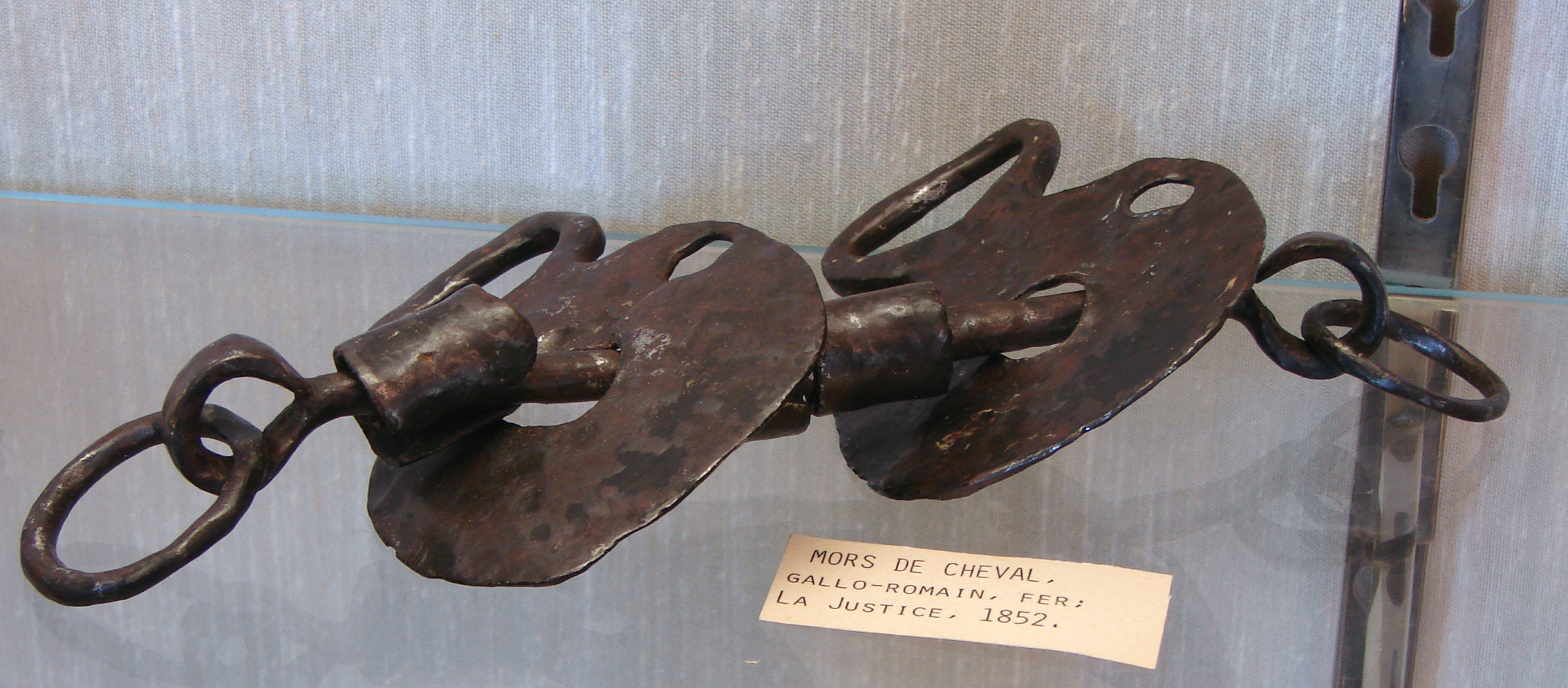 Mors en fer, époque gallo-romaine, musée de Laon.